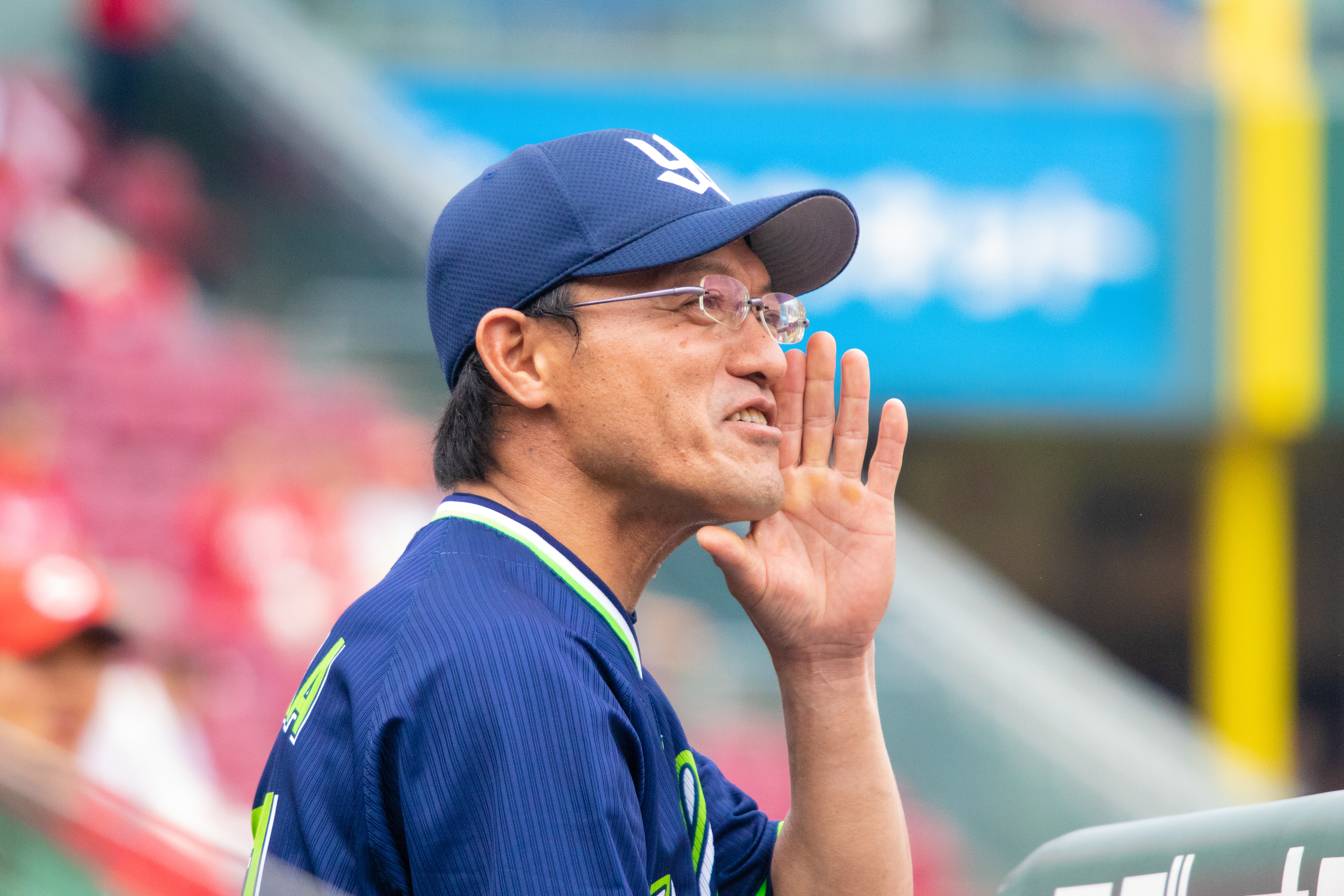 2018年7月4日 マツダスタジアムにて